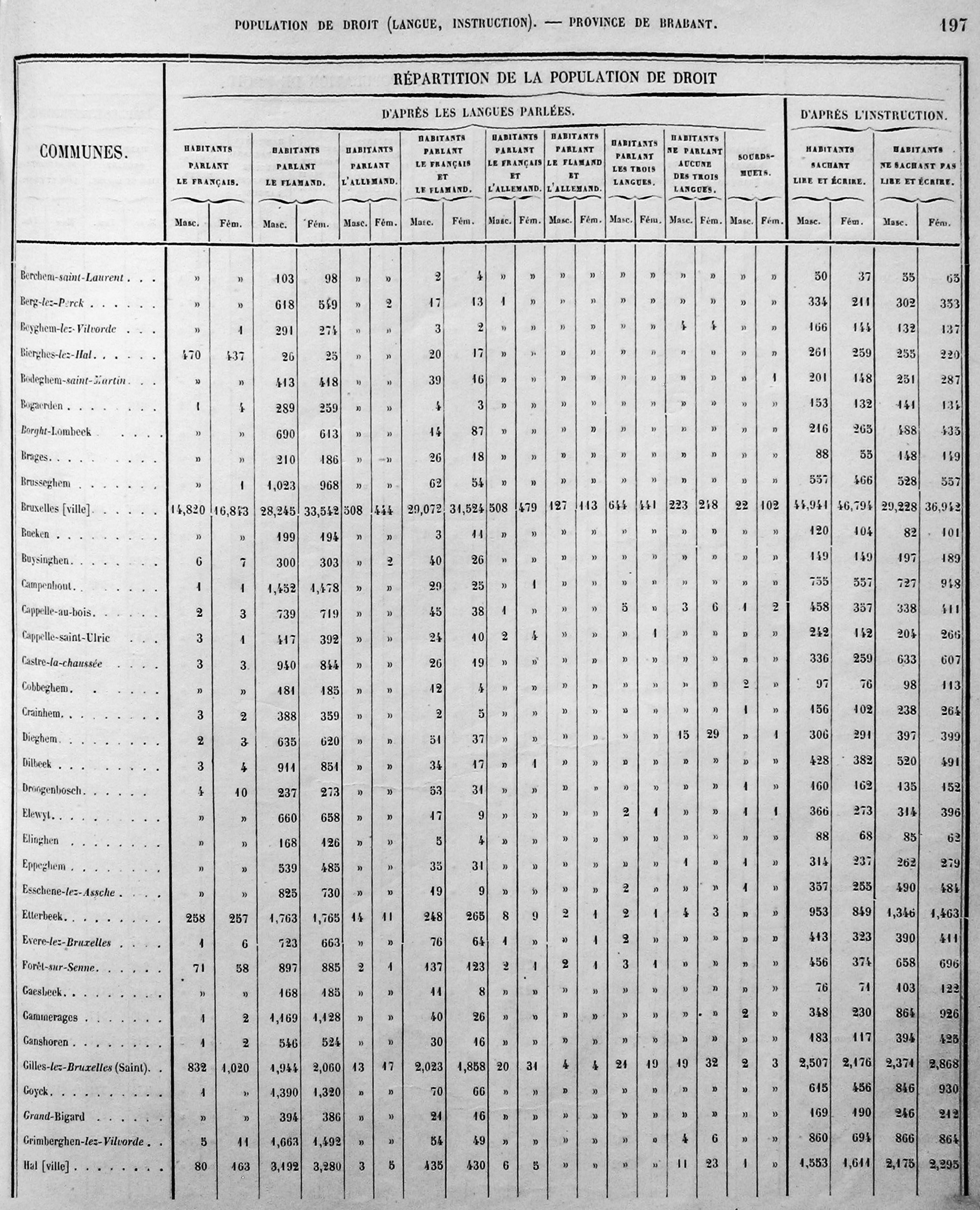 Resultaten van de talentelling 1866 zoals gepubliceerd in het Belgisch Staatsblad